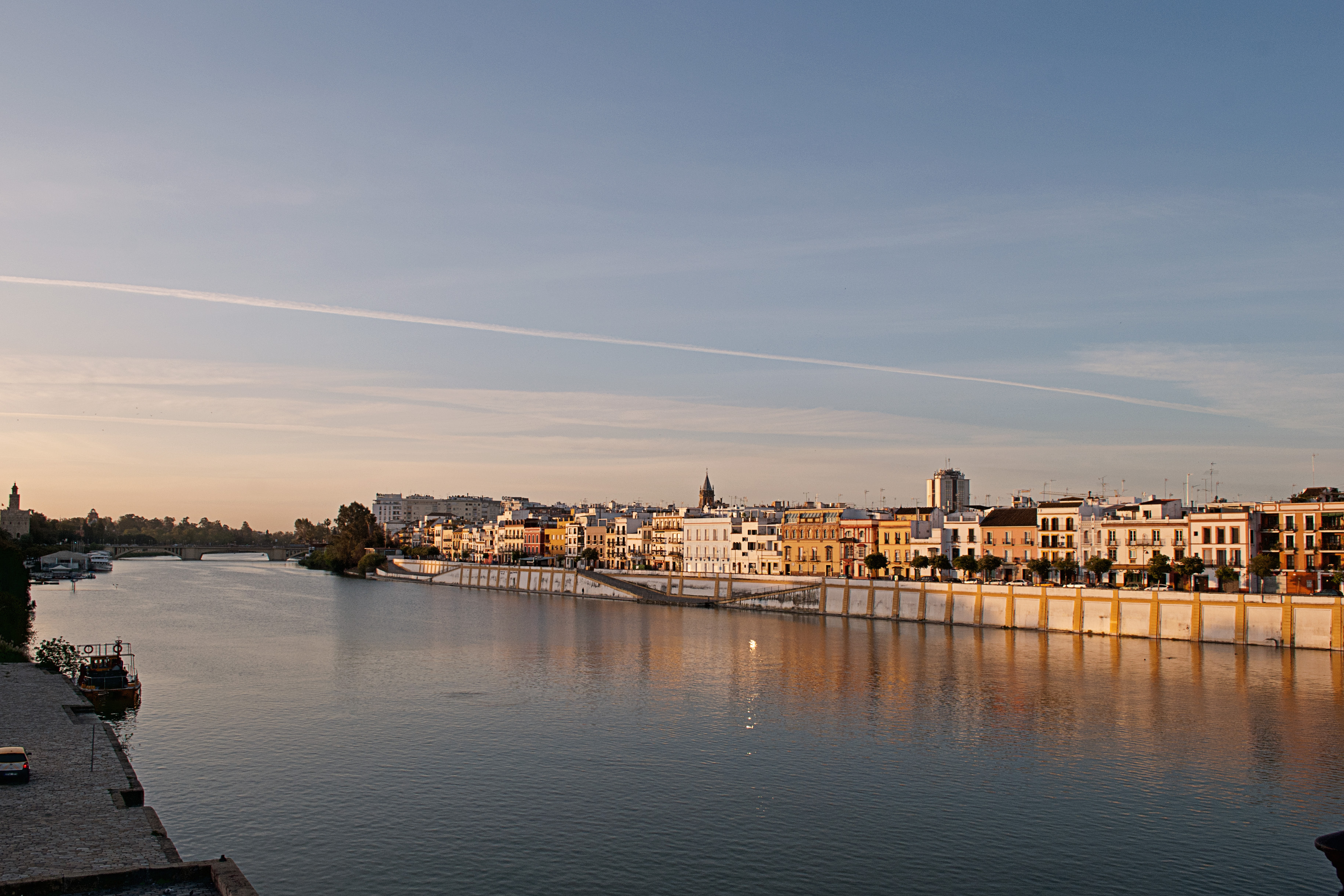 El río Guadalquivir a su paso por Sevilla y vista de la calle Betis.